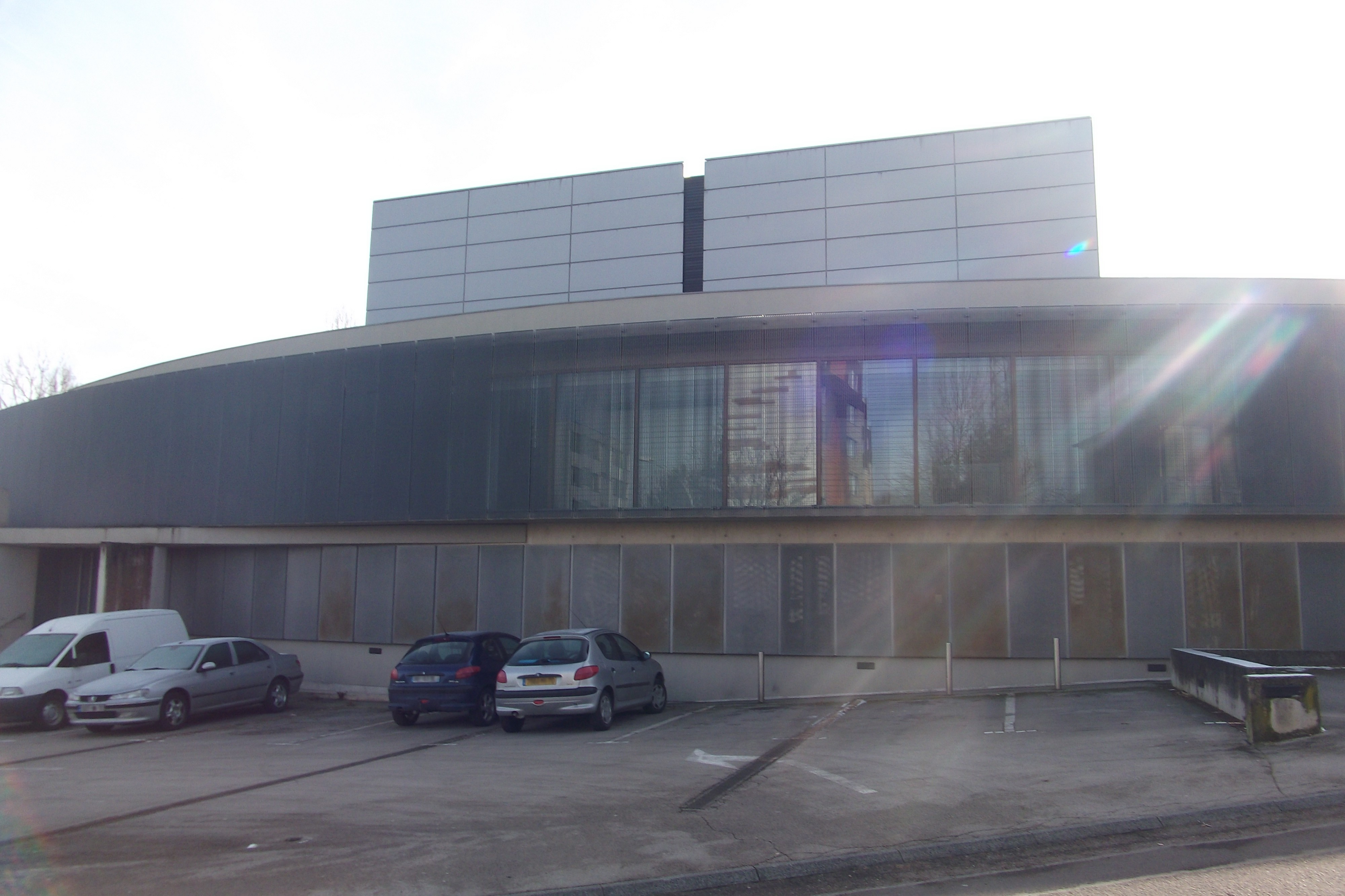 Les Archives départementales de la Haute-Saône à Vesoul